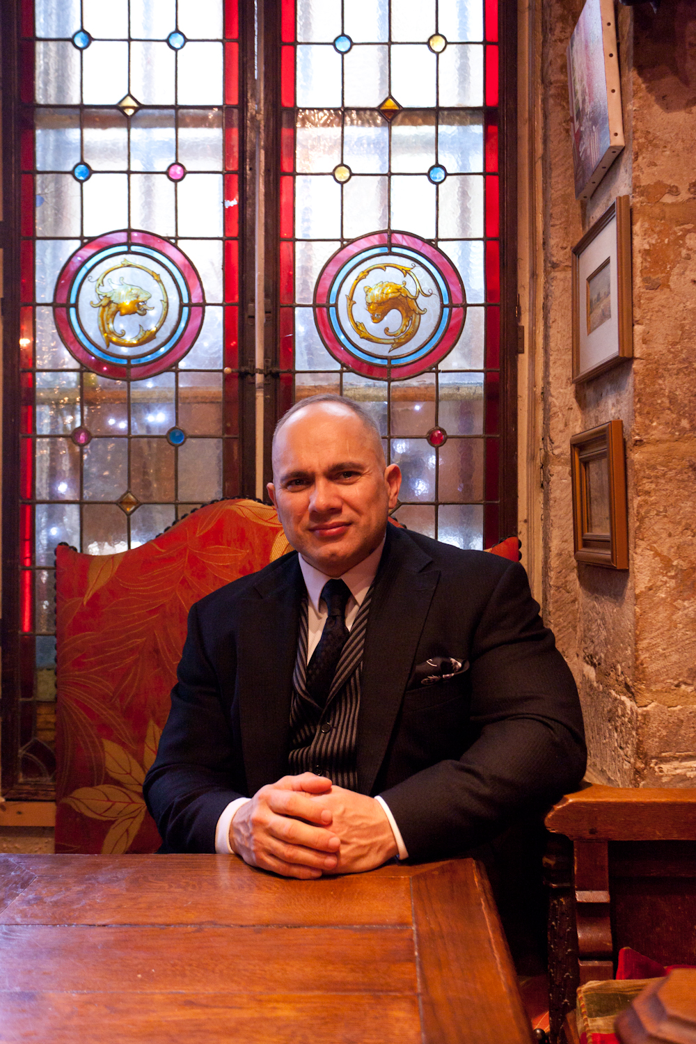 Portrait de Stéphane Chaudesaigues.